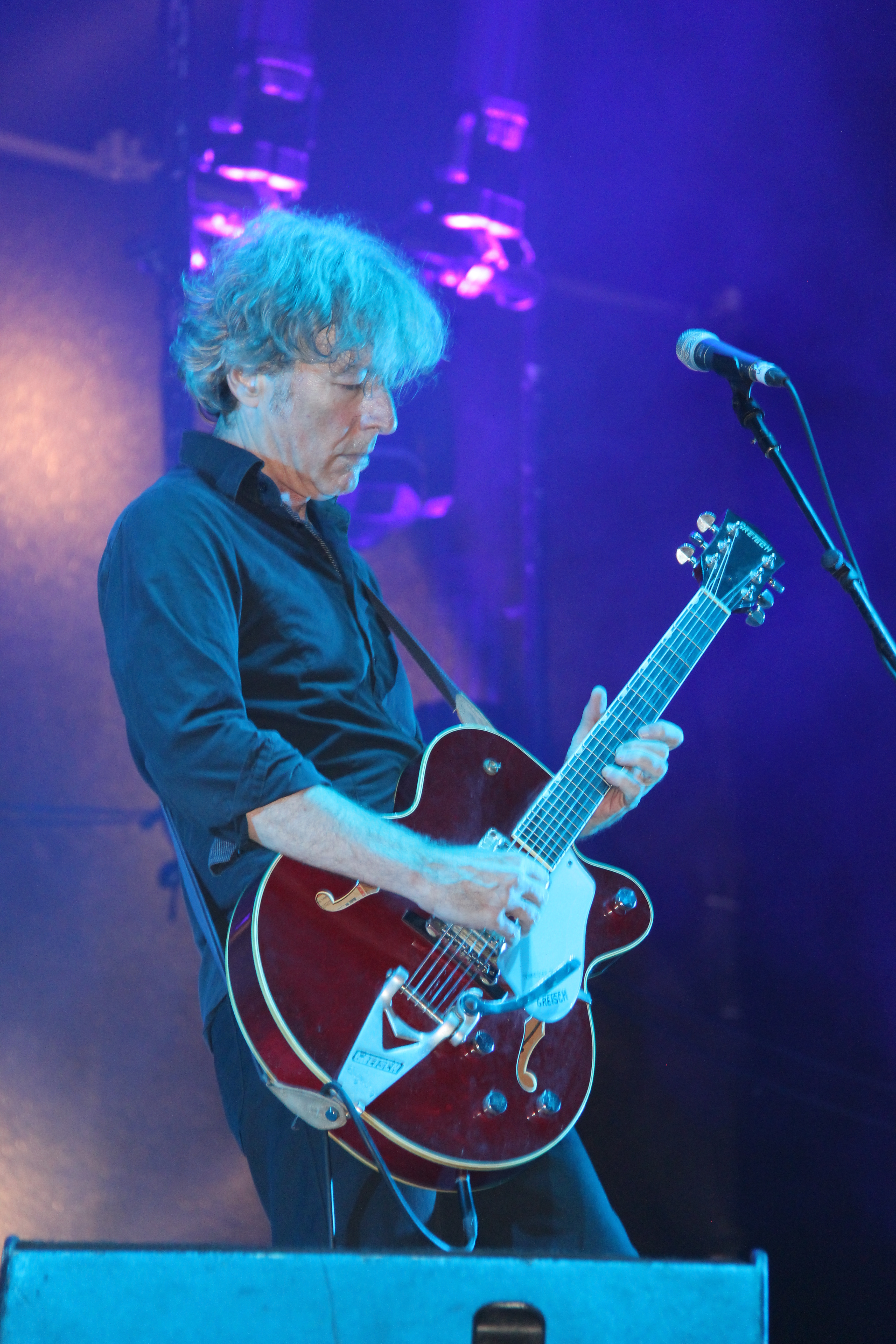 ברי סחרוף בהופעה באמפי שוני, מאי 2011